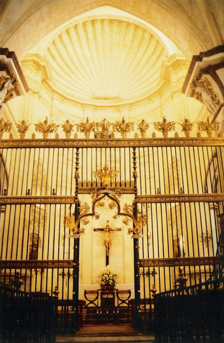 Reja de la capilla mayor de la iglesia de Chinchilla